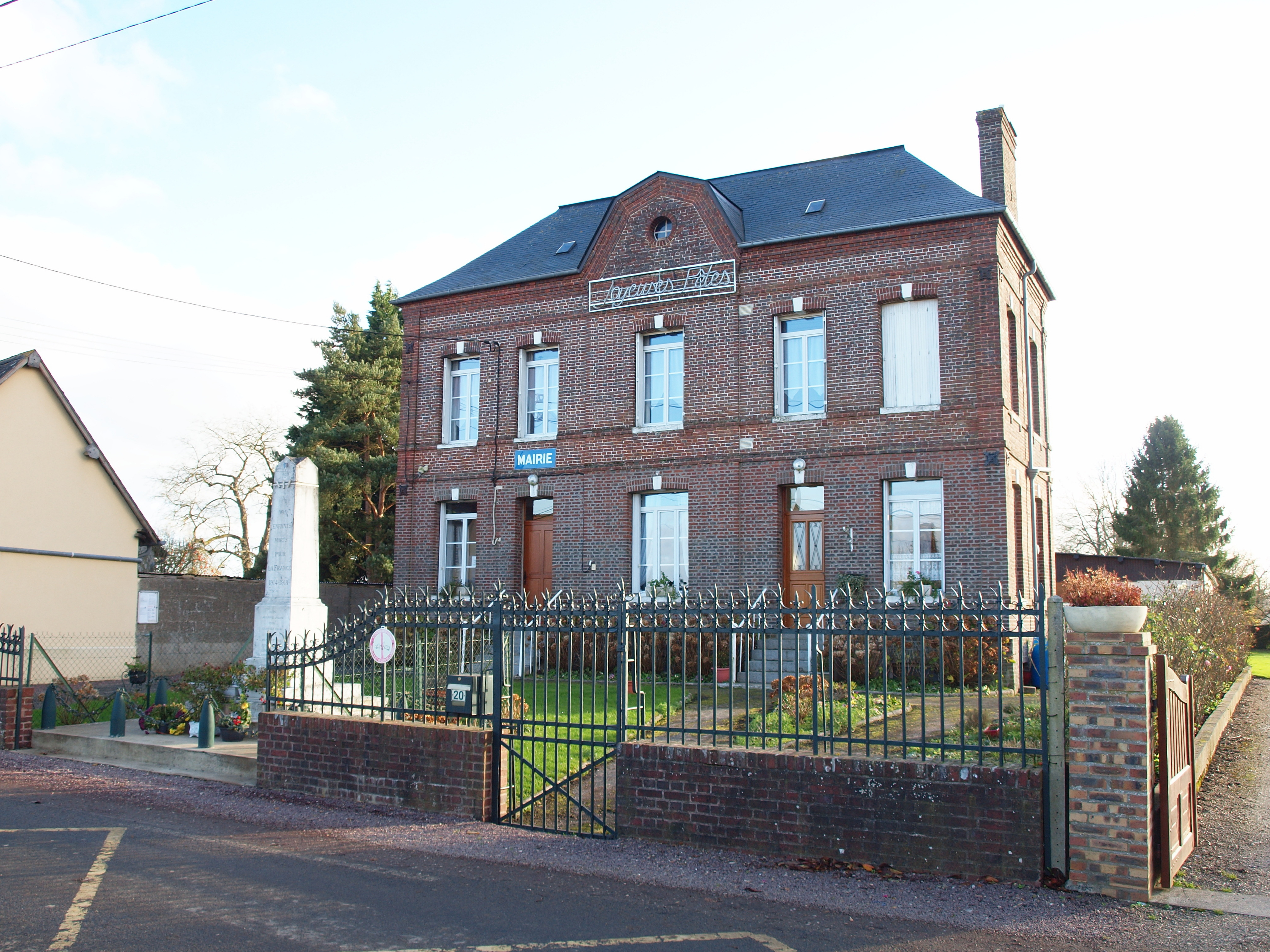 Saint-Martin-au-Bosc (Seine-Maritime, France)